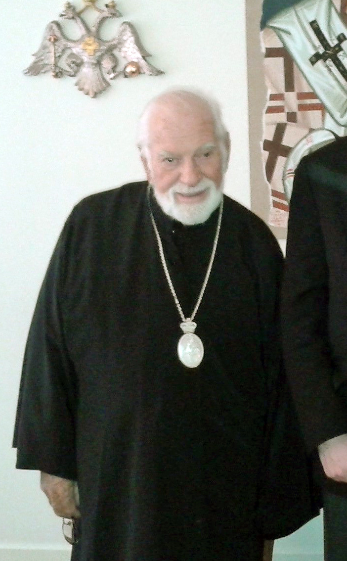 Την Παρασκευή 28 Μαρτίου, ο Υφυπουργός Εξωτερικών Κυριάκος Γεροντόπουλος συναντήθηκε με τον Μητροπολίτη Σικάγου Ιάκωβο στην έδρα της Ιεράς Μητροπόλεως.